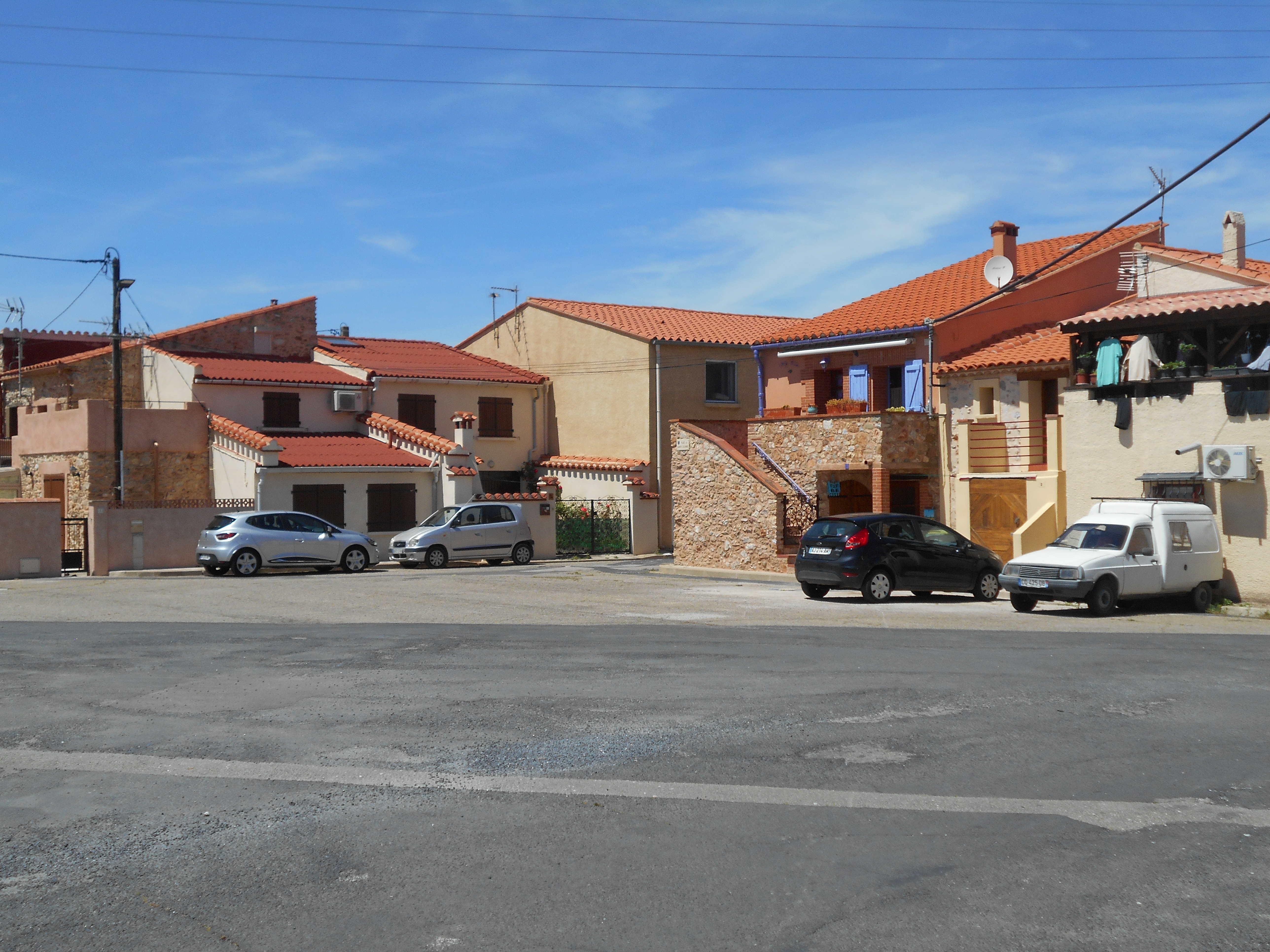 El poble de Santa Coloma de Salses